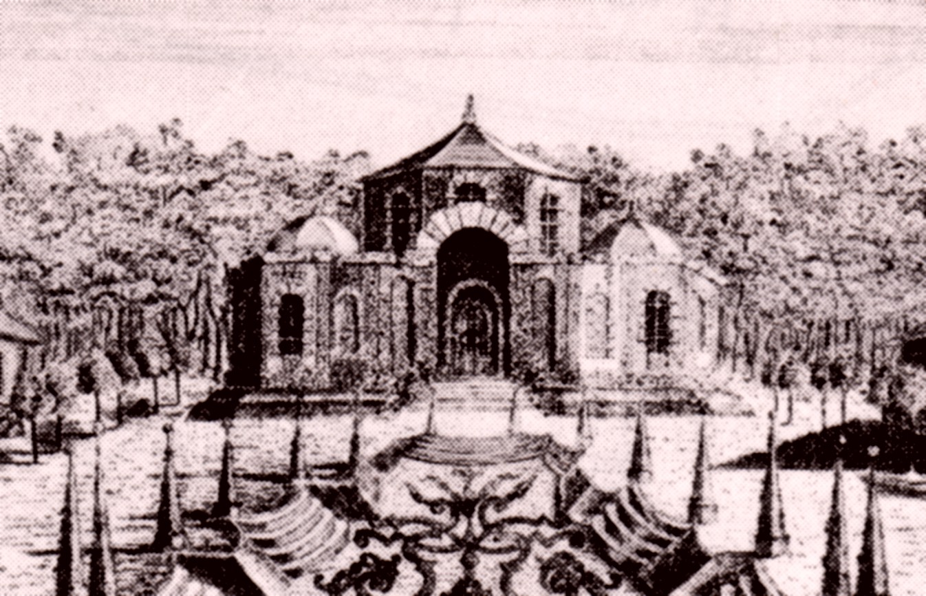 Felsengarten Sanspareil (Franken, Bayern), Morgenländischer Bau, Ausschnitt aus einem Stich von Johann Thomas Köppel, Bayreuth 1748